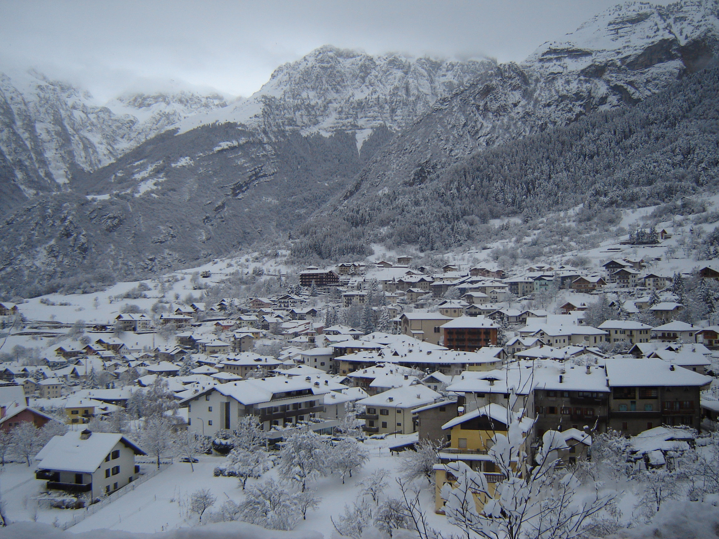 Autore = Jmz1902 Fonte = fatto da me descrizione=Foto di S.Lorenzo in Banale